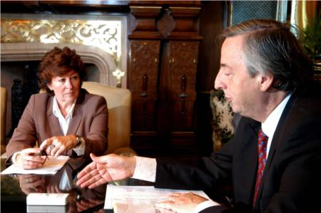 Casa Rosada, Despacho Presidencial - El presidente Néstor Kirchner recibió a la comisionada de Derechos Humanos de la ONU, Louise Arbour. Firmó el decreto Nº 1086 que contiene los lineamientos del Plan Nacional Contra la Discriminación.